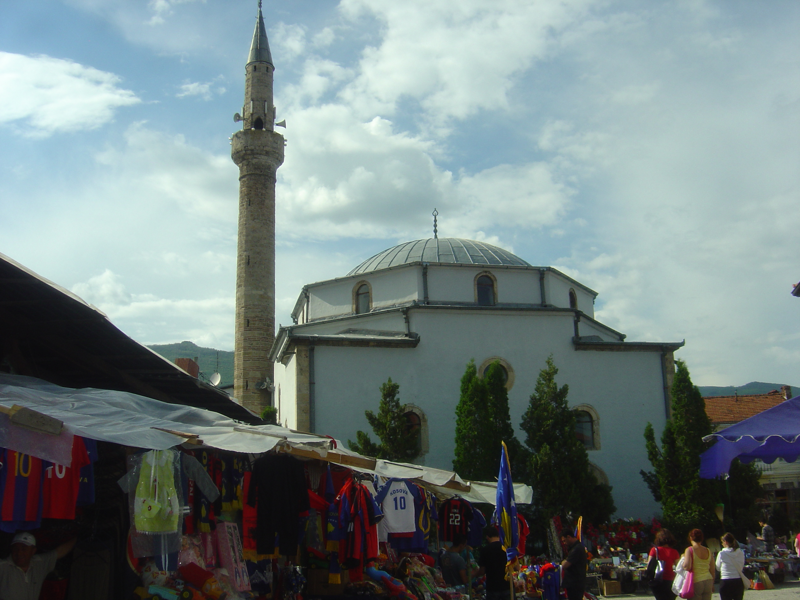 Πέγια: Το Τέμενος Μπα'ι'ρακλί (15ος αι.)